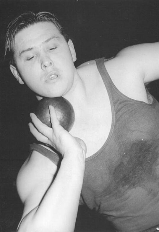 Jiri Skobla Zentralbild Wlocka 10.03.1957 DDR-Hallen-Leichtathletikmeisterschaften. Am Sonnabend, dem 09.03.1957, fand in der Sporthalle der DHfK, Leipzig, die DDR-Hallen-Leichtathletikmeisterschaft statt. Als internationale Gäste nahmen an den Wettkämpfen auch Sportler aus der CSR teil. UBz: Im Kugelstossen der Männer siegte der tschechoslowakische Europameister und Bronzemedaillengewinner von Melbourne, Jí?i Skobla [Porträt Jiri Skobla] Abgebildete Personen: Skobla, Jiri: 1930-1978; Leichtathlet, CSSR